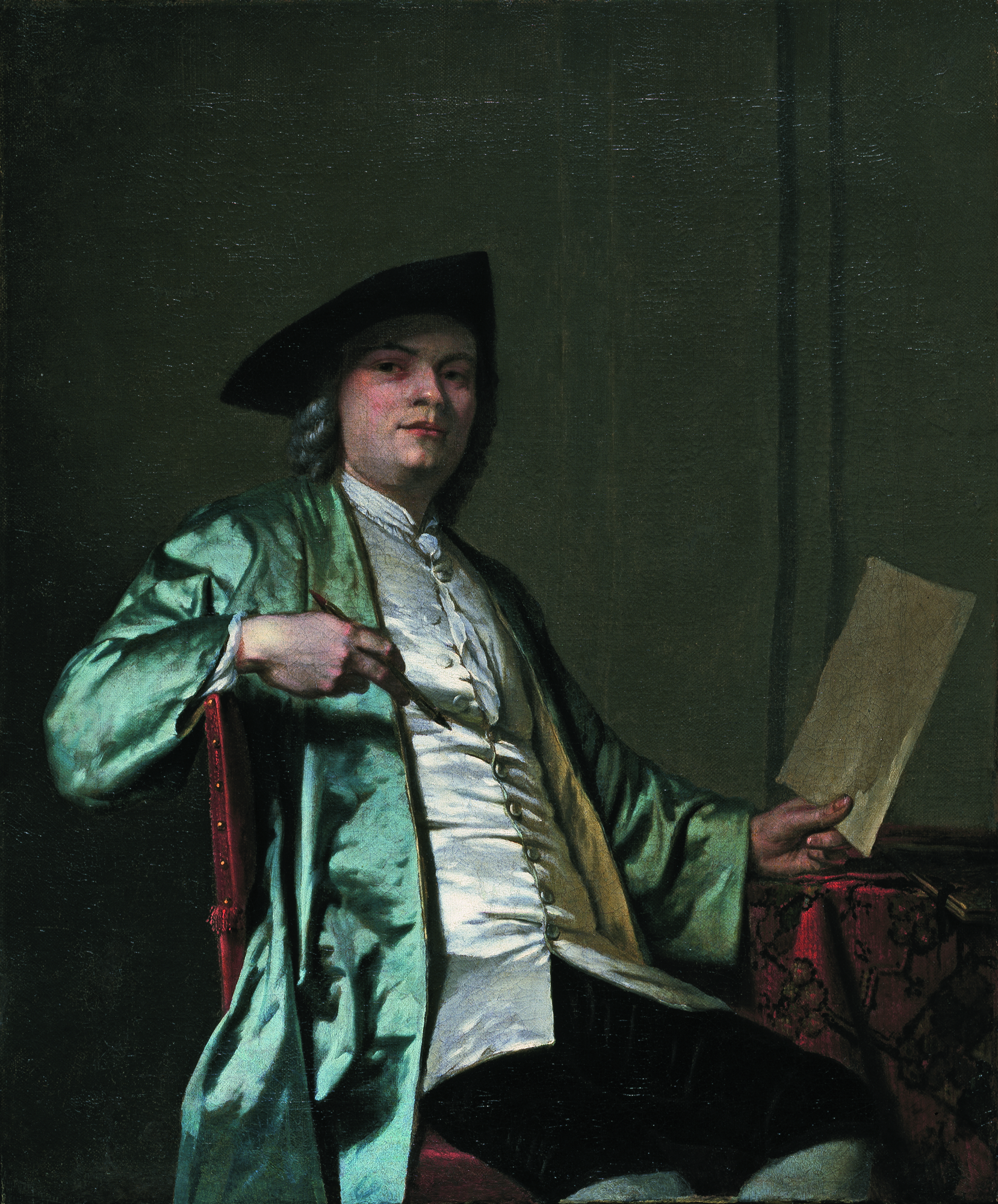 Portrait of Cornelis Ploos van Amstel. Pendant of File:George van der Mijn 001.jpg.